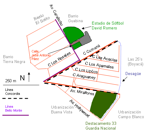 Mapa del sector Miraflores. Cabimas. Estado Zulia. Venezuela